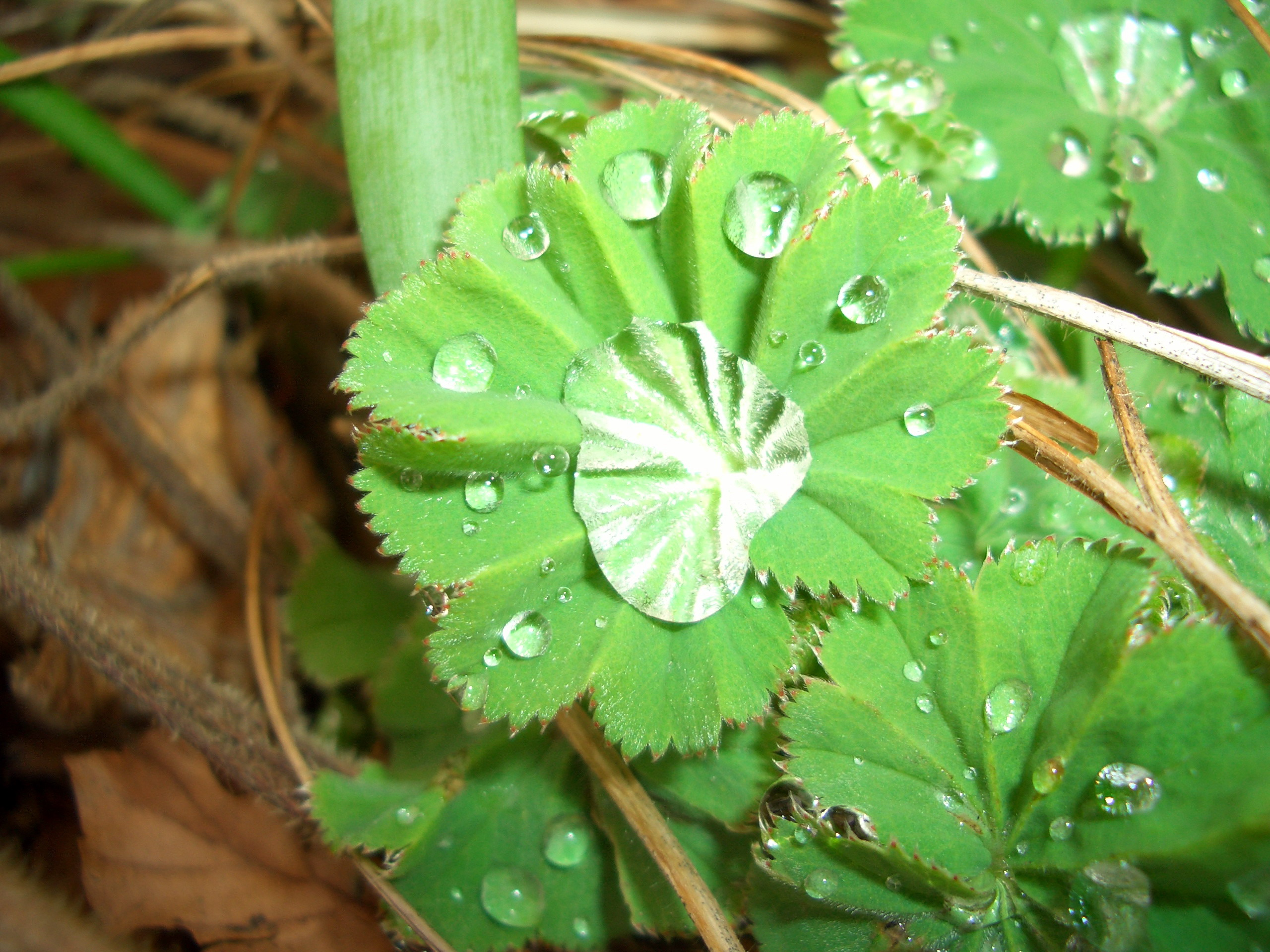 Gemeiner Frauenmantel (Alchemilla vulgaris) mit „Diamanten“ aus Regentropfen